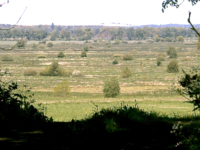 Żelazo, widok w kierunku N